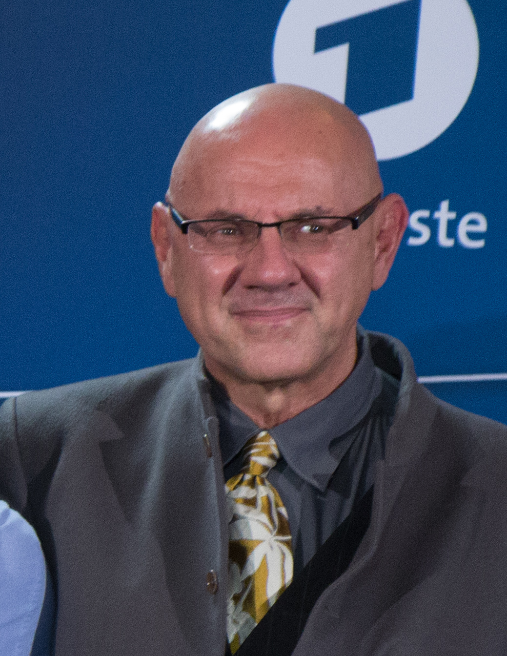 Fotocall im Rahmen der Preview des Tatorts „Der wüste Gobi“ u.a. mit Nora Tschirner.